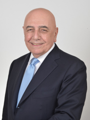 Adriano Galliani nel 2018